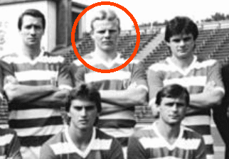 Title: Mannschaftsfoto HFC Chemie Factual corrections and alternative descriptions are encouraged separately from the original description. Additionally errors can be reported at this page to inform the Bundesarchiv. Original historic description: ADN-ZB-Lehmann-23.8.83-zin-Halle: Die Mannschaft des HFC Chemie für die Fußball-Oberligasaison 1983-84. Vorn v.l.n.r.: Jens Helling, Lutz Radtke, Torhüter Frank Jaenecke, Torhüter Michael Walther, Uwe Lorenz und Holger Krostitz. Mitte v.l.n.r.: Roland Wawrzyniak, Dieter Strozniak, Jens Henschel, Werner Peter, Frank Pastor und Lothar Kurbjuweit. Stehend v.l.n.r.: Klaus Urbanczyk, verantwortlicher Oberligatrainer, Nobert Schübbe, Gerald Wagner, Andreas Wagenhaus, Jürgen Schliebe, Manfred Fülle, Mannschaftskapitän Hartmut Meinert, Michael Rehschuh, Wolfgang Schmidt und Trainer Wolfgang Kleinschmager.